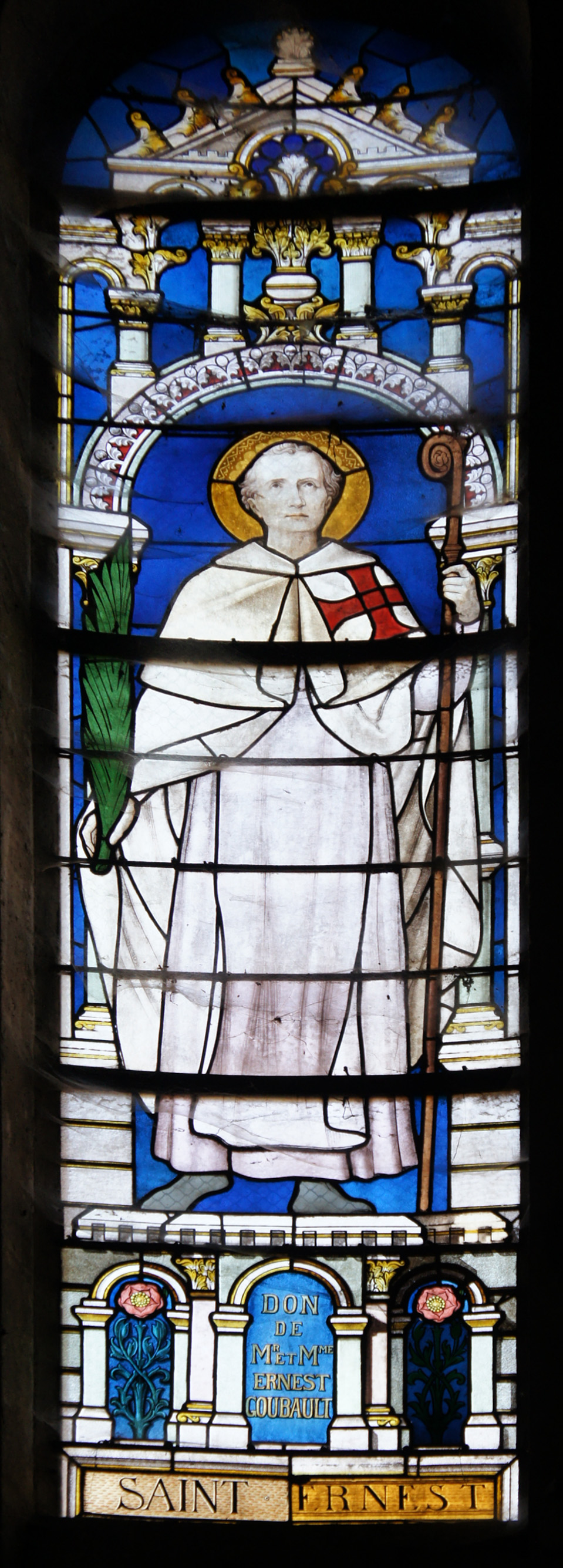 En l'Église Saint-Pierre Saint-Paul (Épernay).